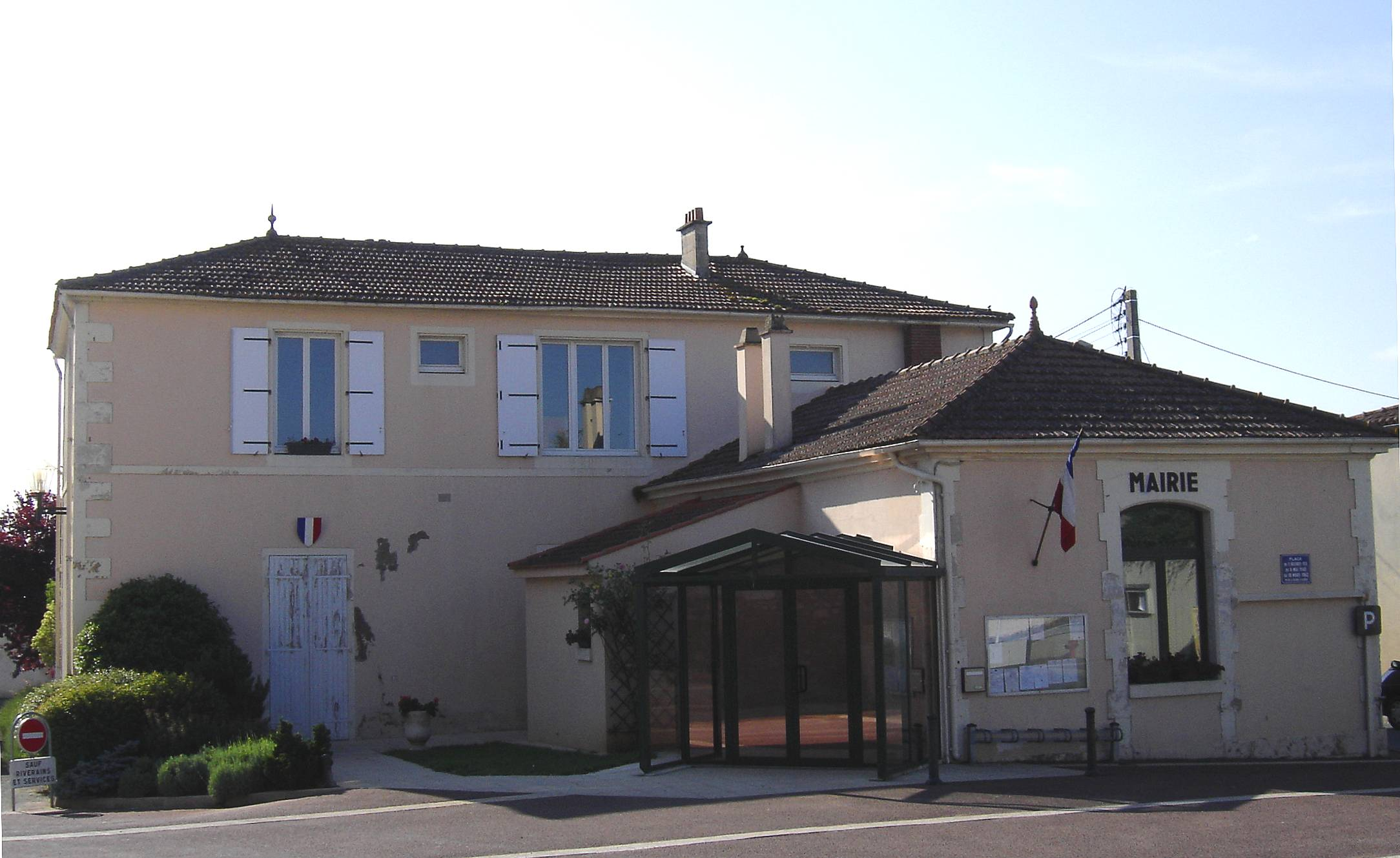 mairie de Mouzeuil Saint Martin